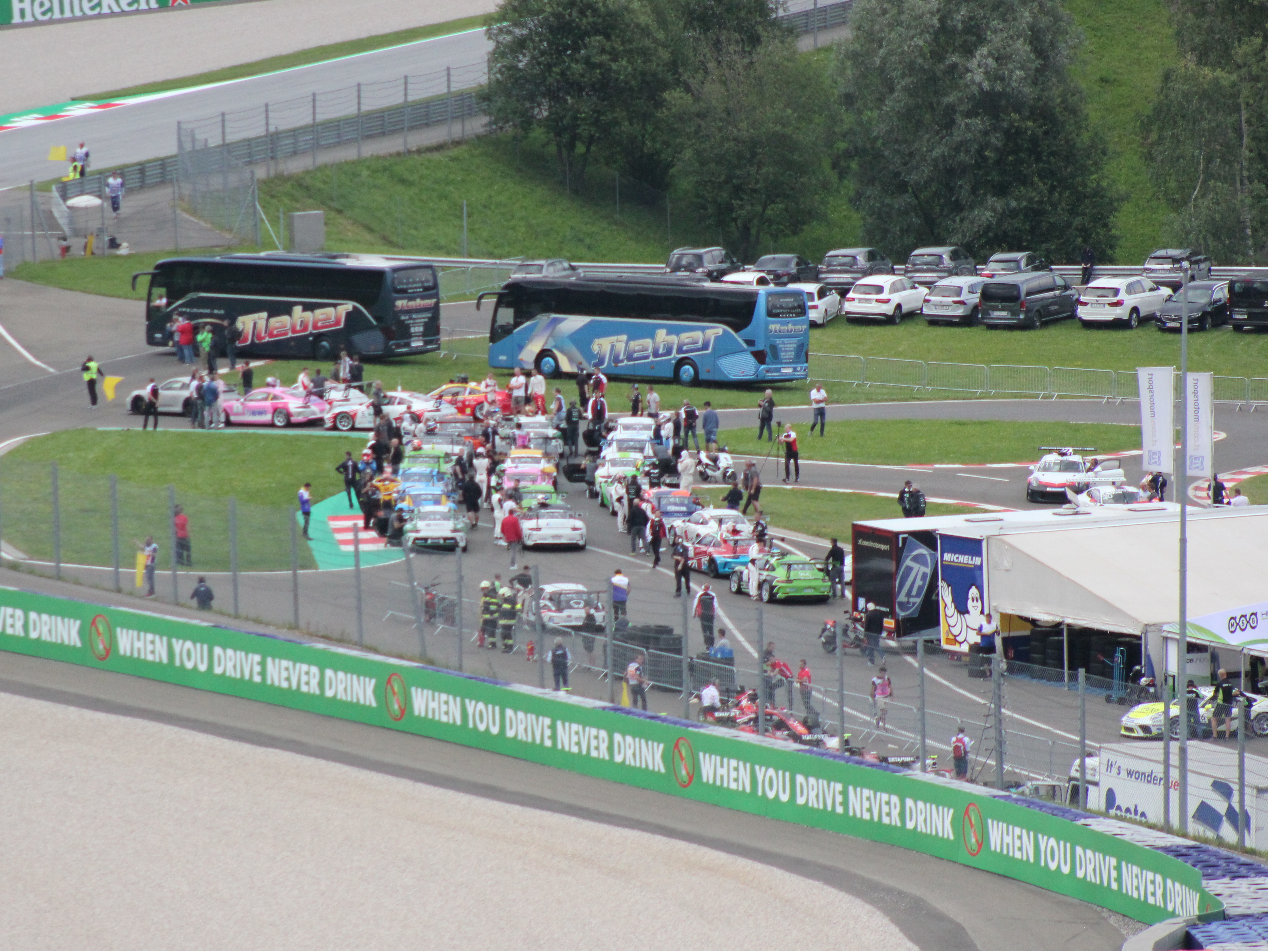 Das Fahrerlager des Porsche Supercups beim Rennwochenende in Österreich 2018